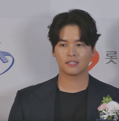 17일 오후 서울시 영등포구 여의도 콘래드 서울에서 '2019 브랜드 고객충성도 대상' 시상식이 열려 남자배우 부문 수상자 이장우가 참석해 포토타임에 포즈를 취하고 있다.